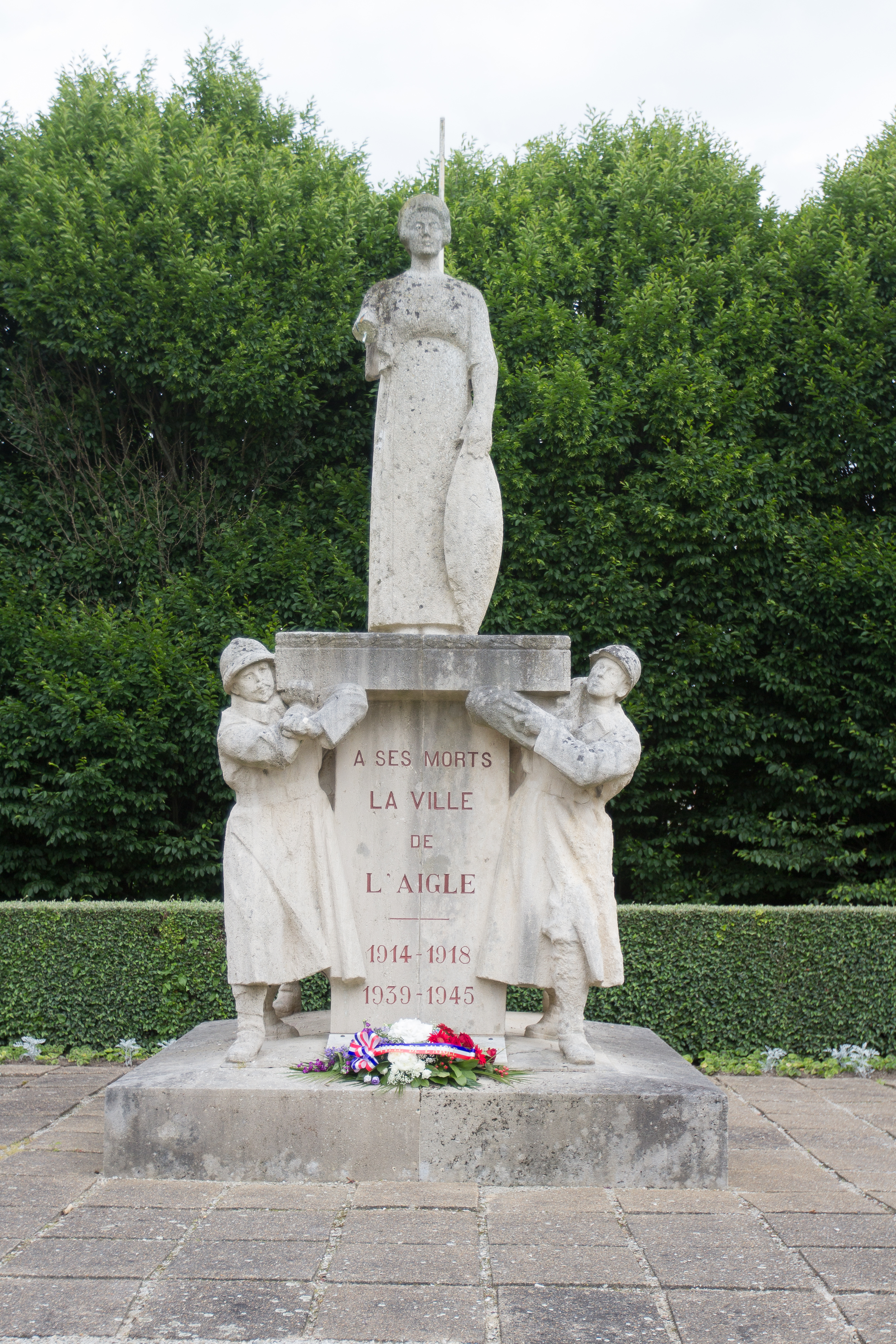 Monuments aux mort de L'Aigle (Eure, Normandie, France)